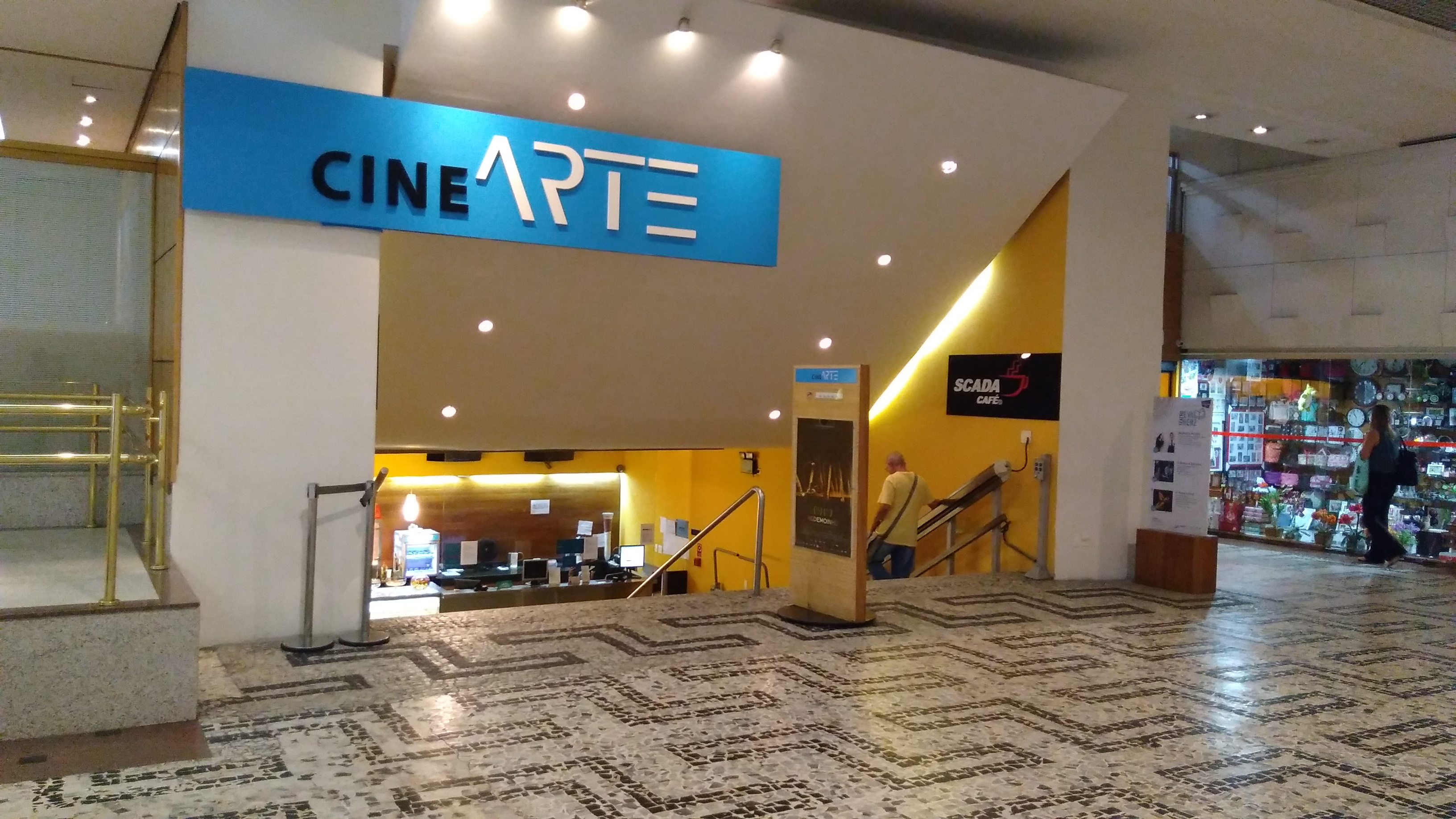 Fachada frontal do Cinearte no Conjunto Nacional em São Paulo, SP